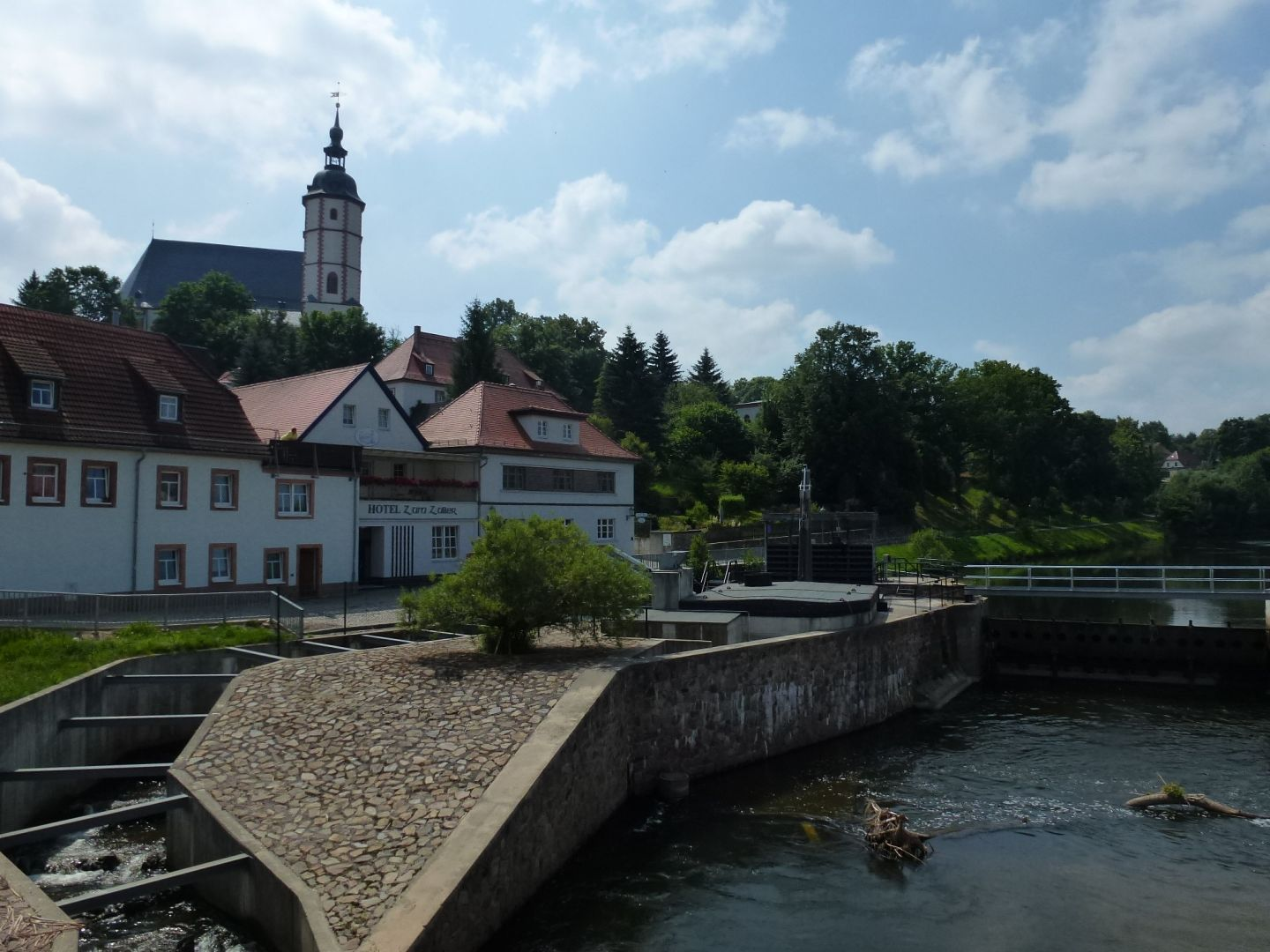 Muldewehr mit Fischtreppe in Penig